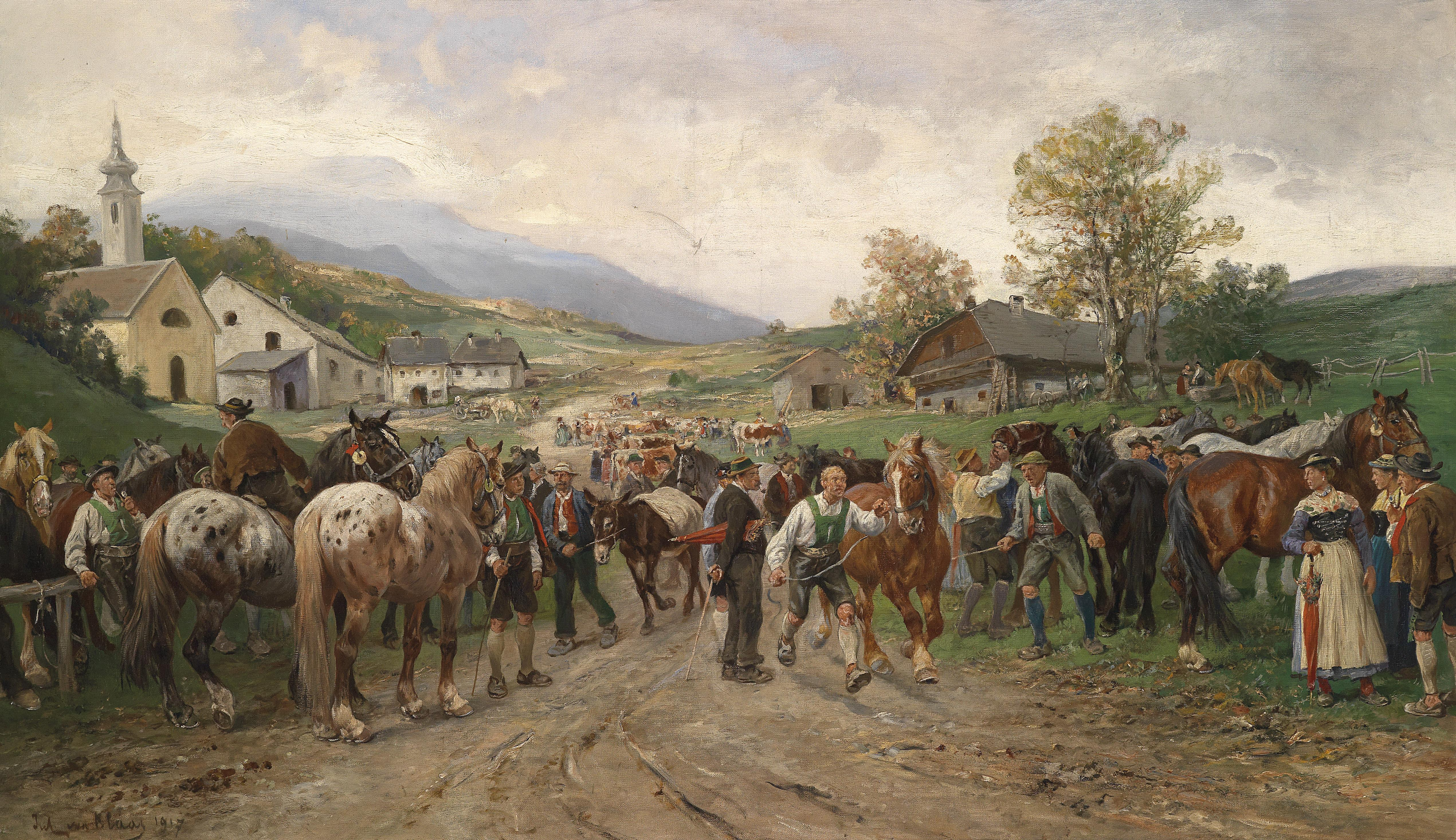 Pferdemarkt